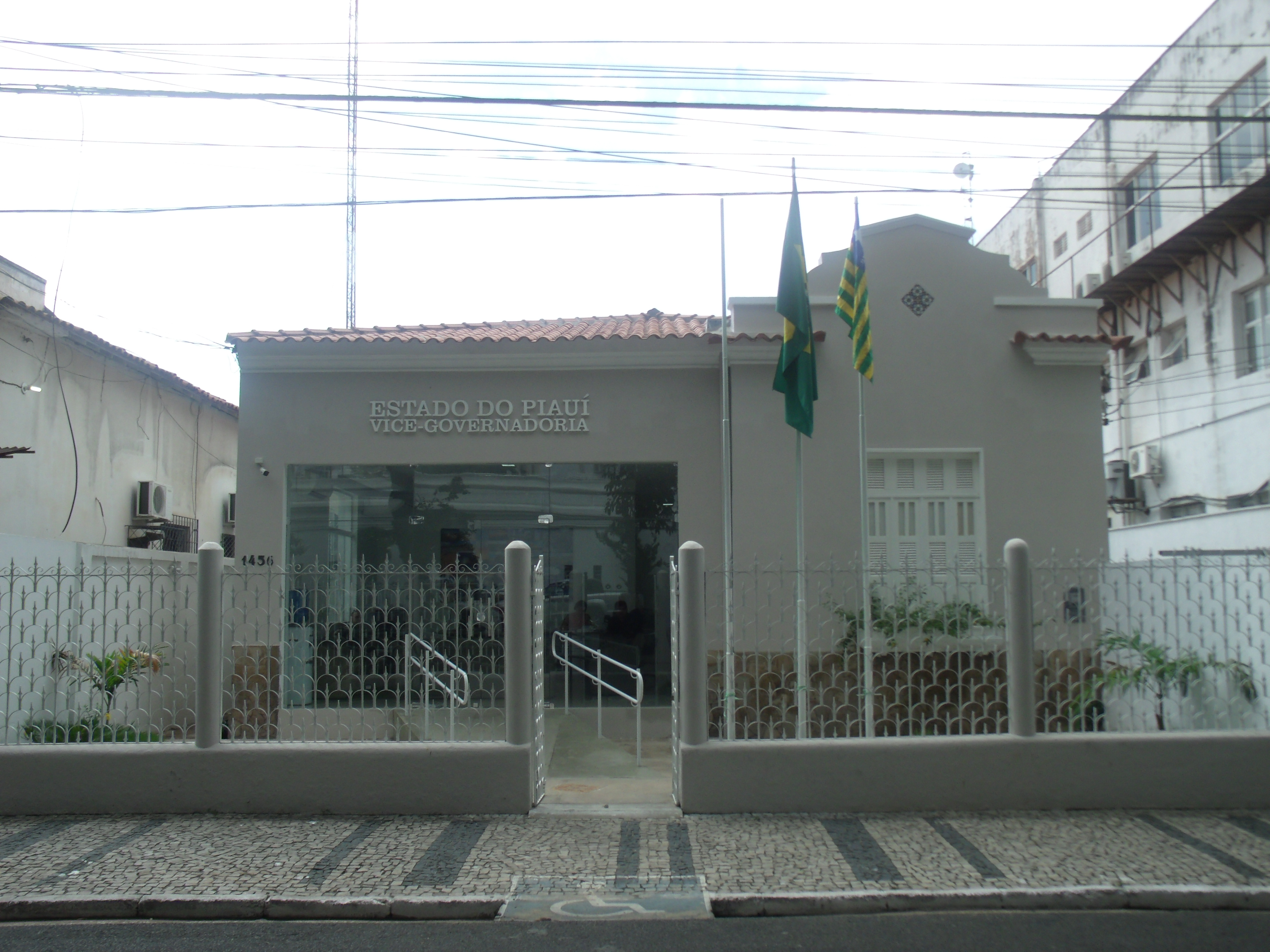 Palacetinho do vice-governador do Piauí.